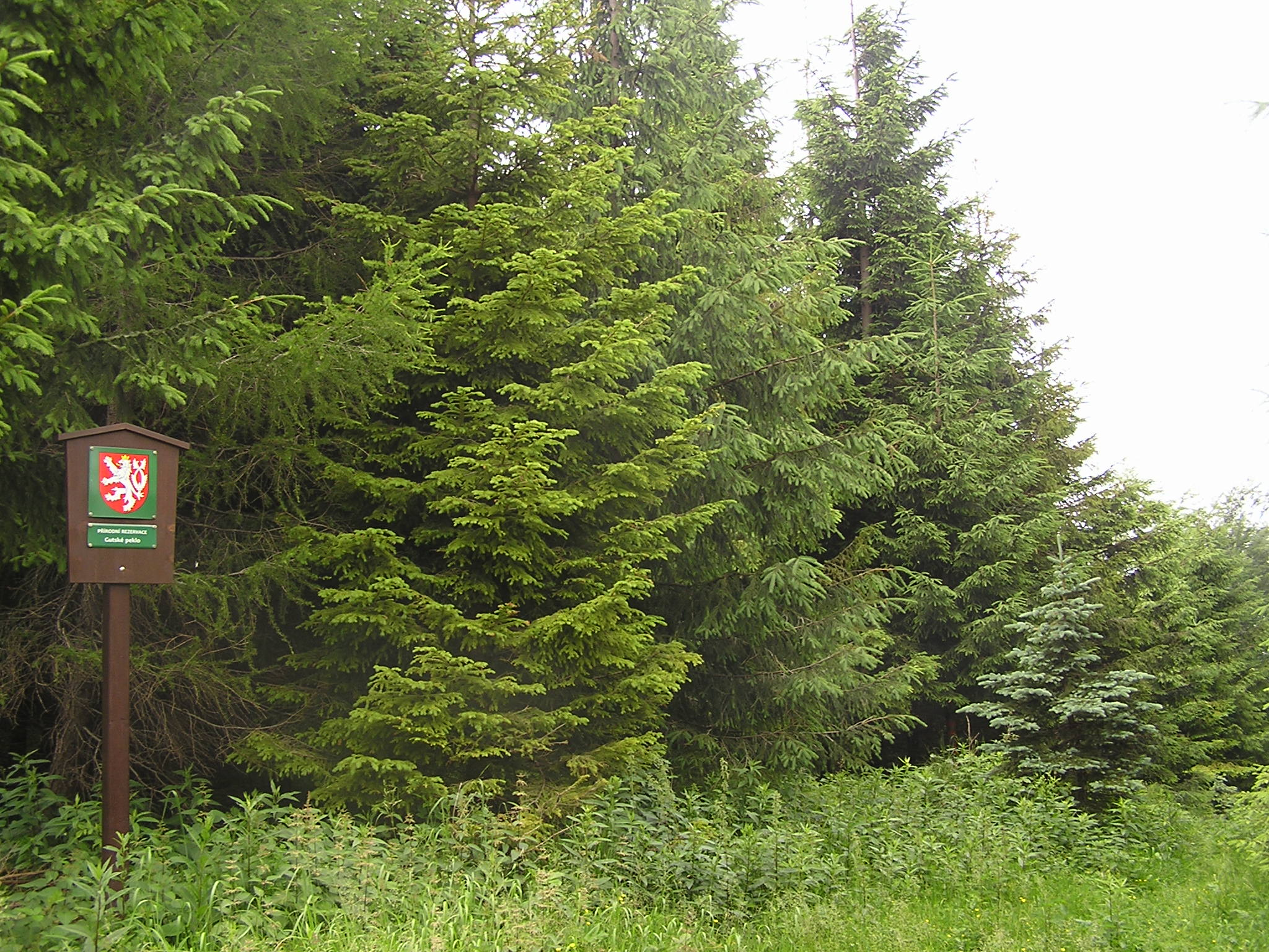 Gutské peklo